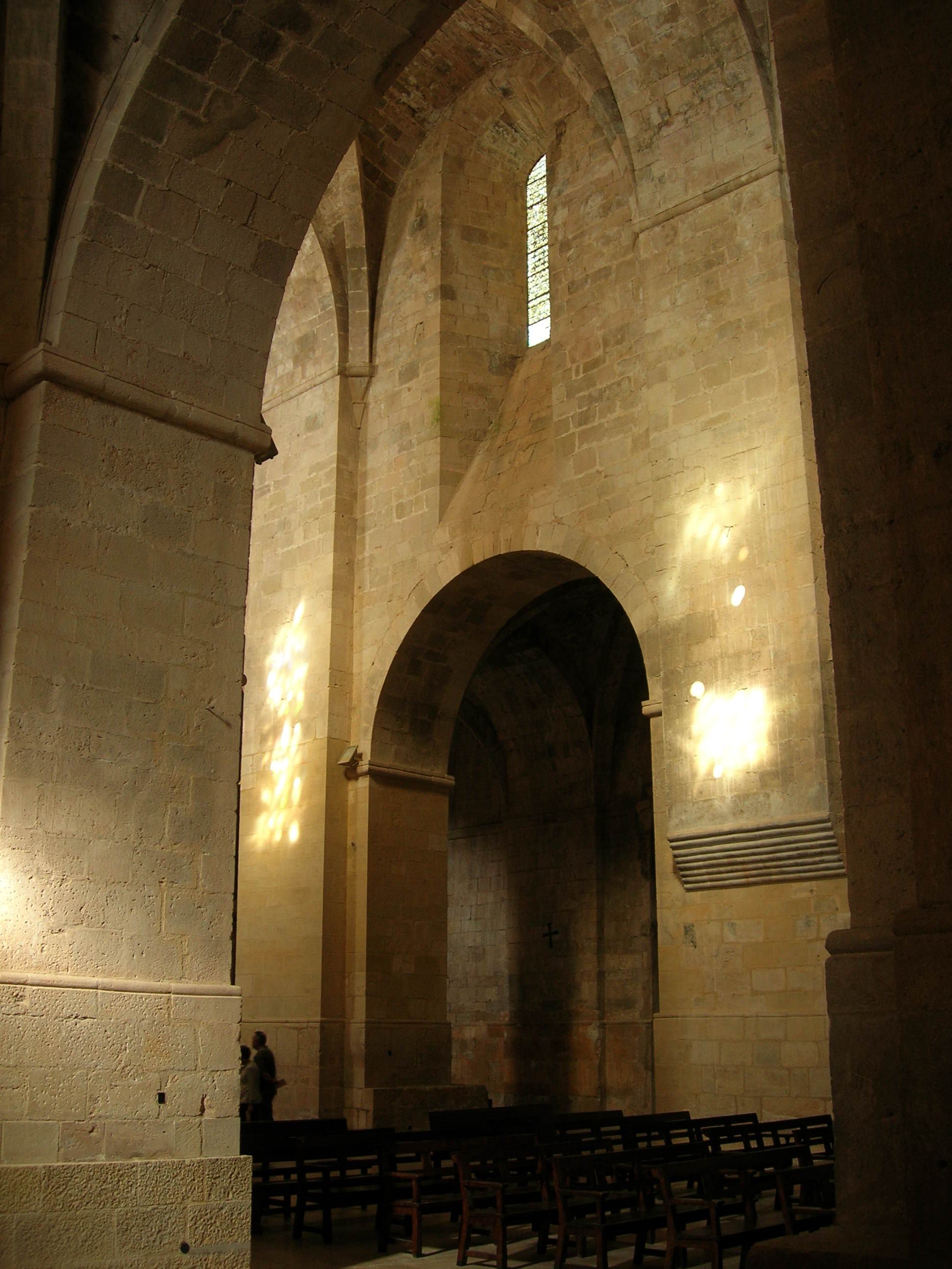 Monastère de Santes Creus, Catalogne, Espagne.